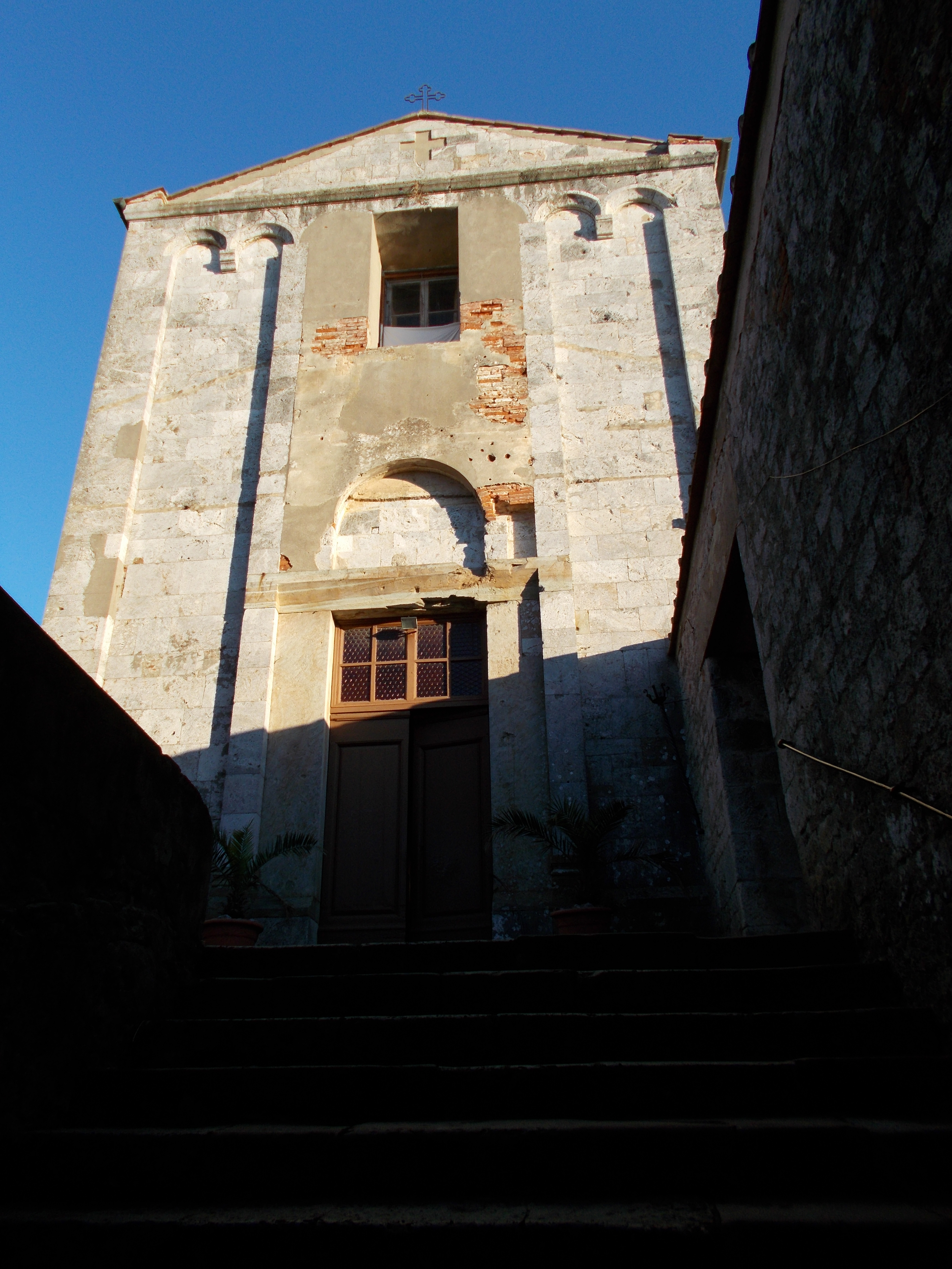 Badia San Savino, Montione, Cascina, Pisa, Italia